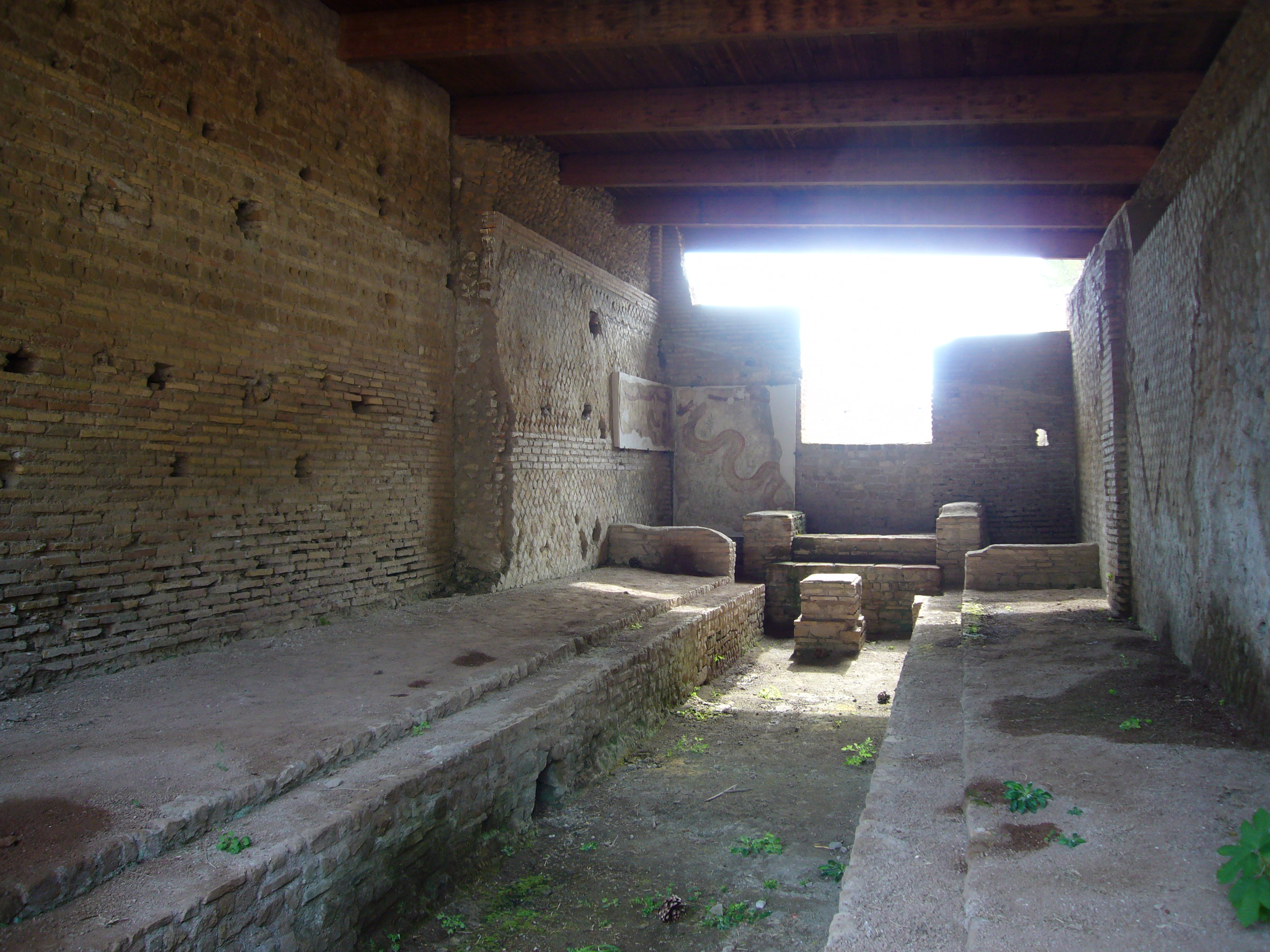 Ostia Antica, Mitreo dei Serpenti